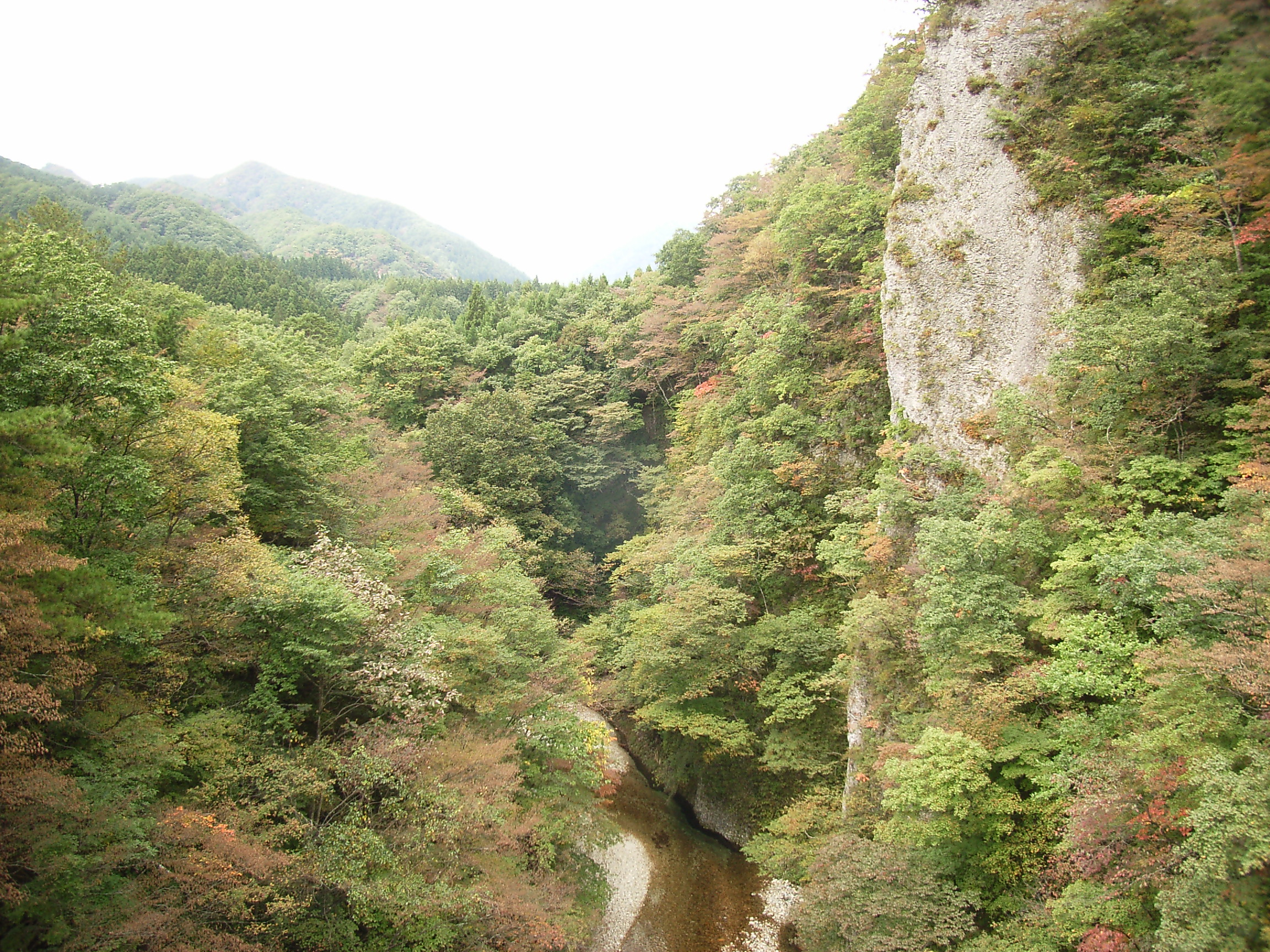 Nikkawa River. Nikkawa, Sendai, Miyagi prefecture, Japan.